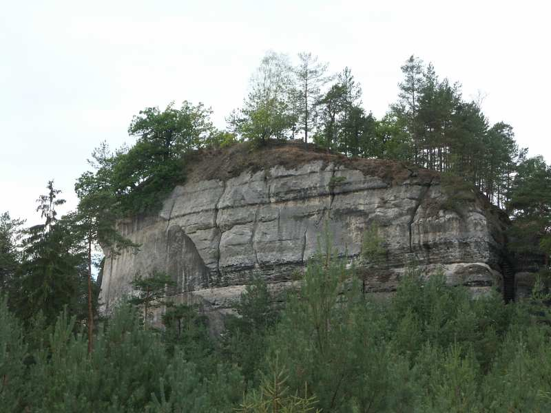 Zbytky feudálního hrádku Stohánek (zal. cca 14. stol.)